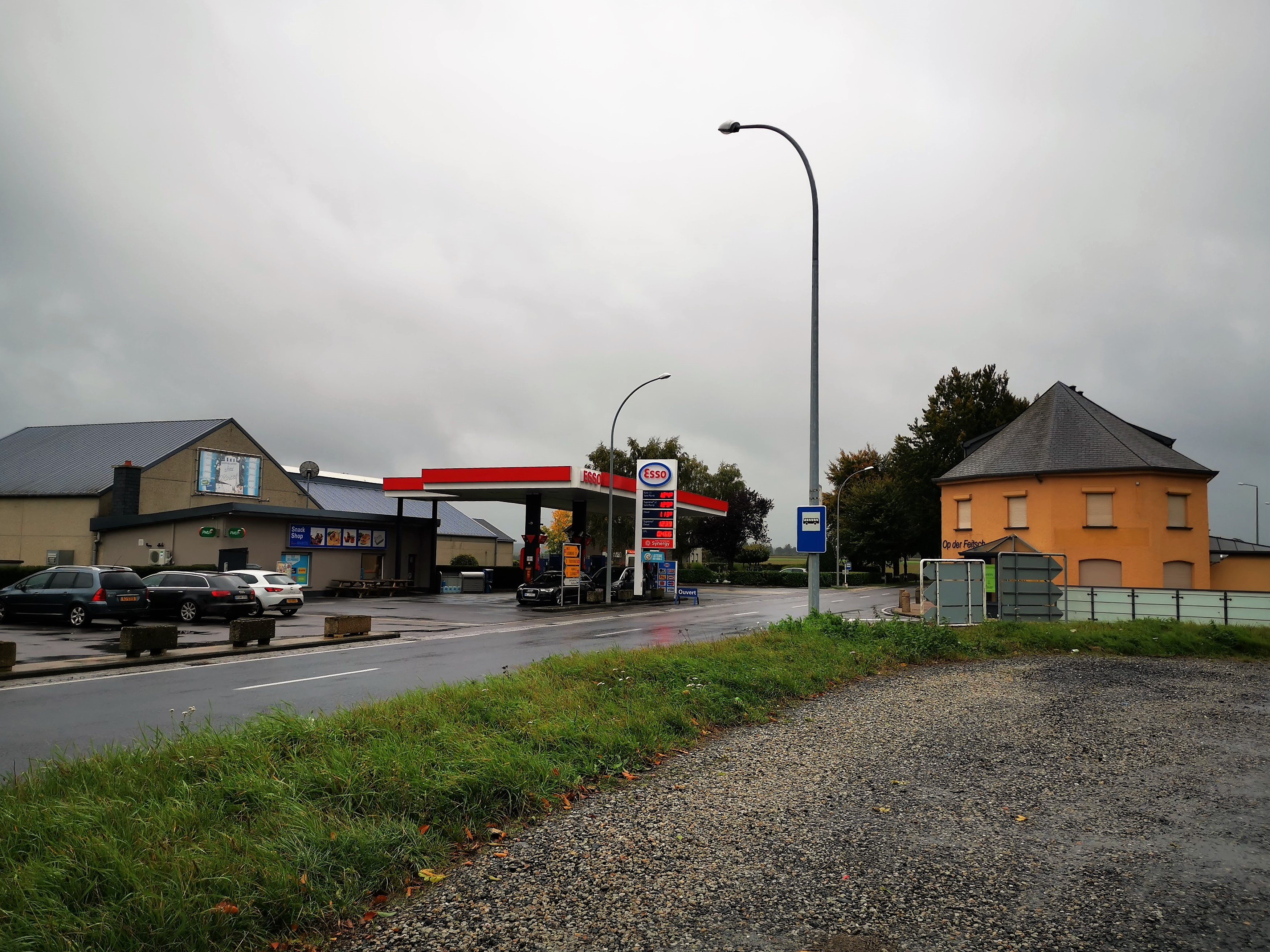 Lieu-dit Féitsch, commune de Wincrange